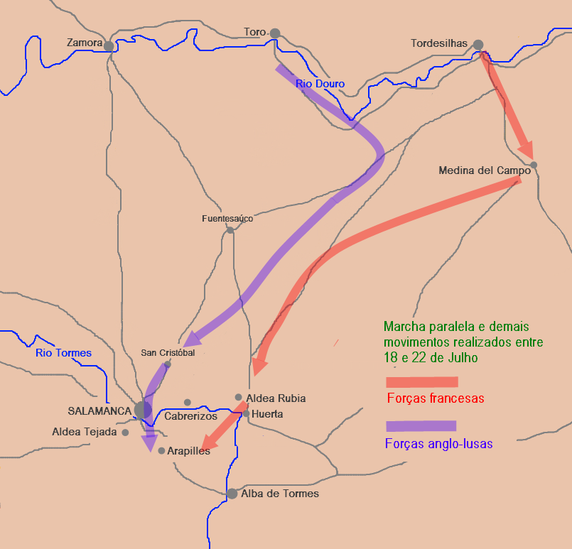 Esquema dos itinerários dos principais movimentos dos exércitos de Wellington e Marmont no movimento entre a linha do Douro e o local da Batalha de Salamanca.